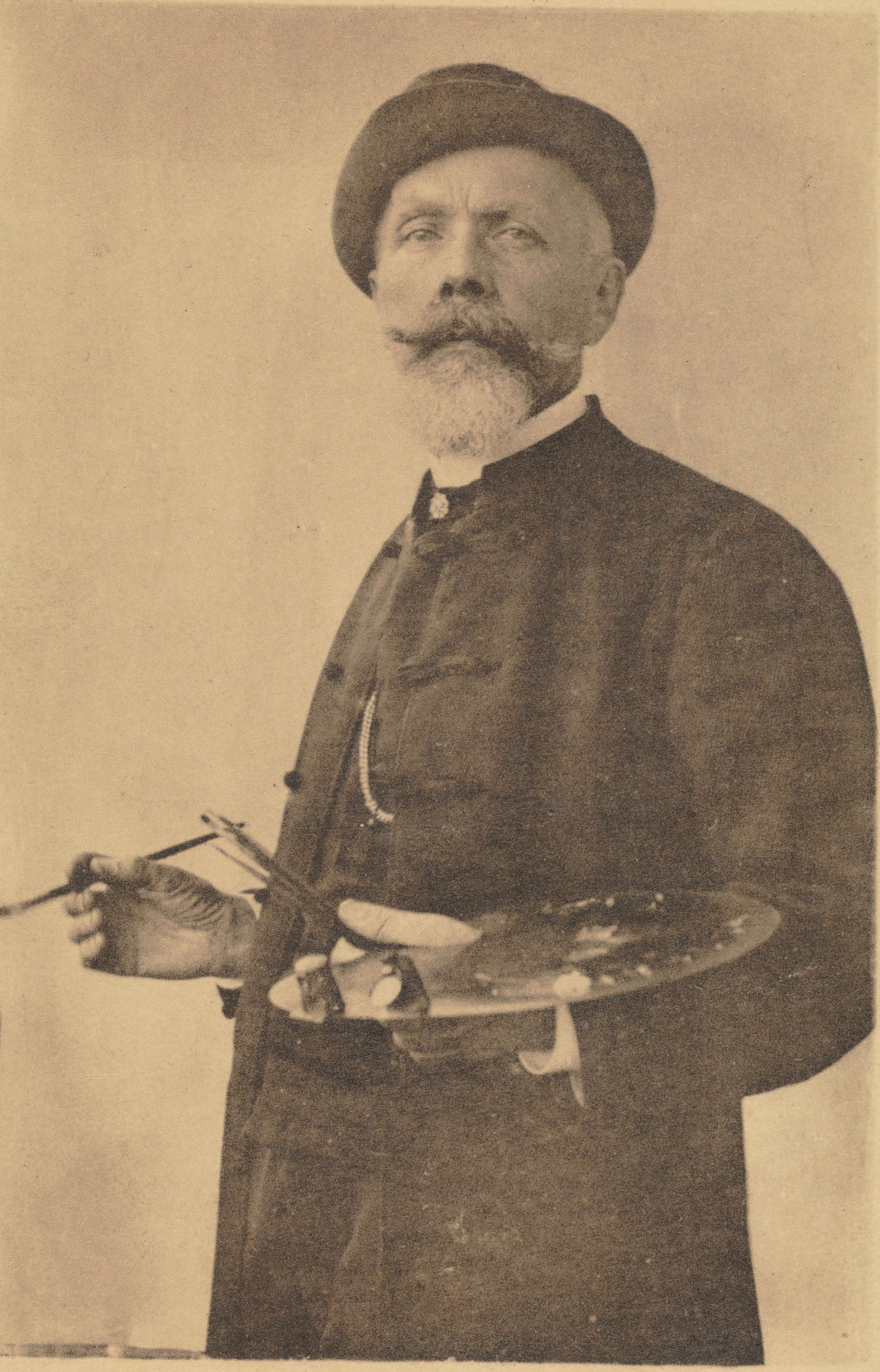 Walery Eljasz Radzikowski, 1909 r.